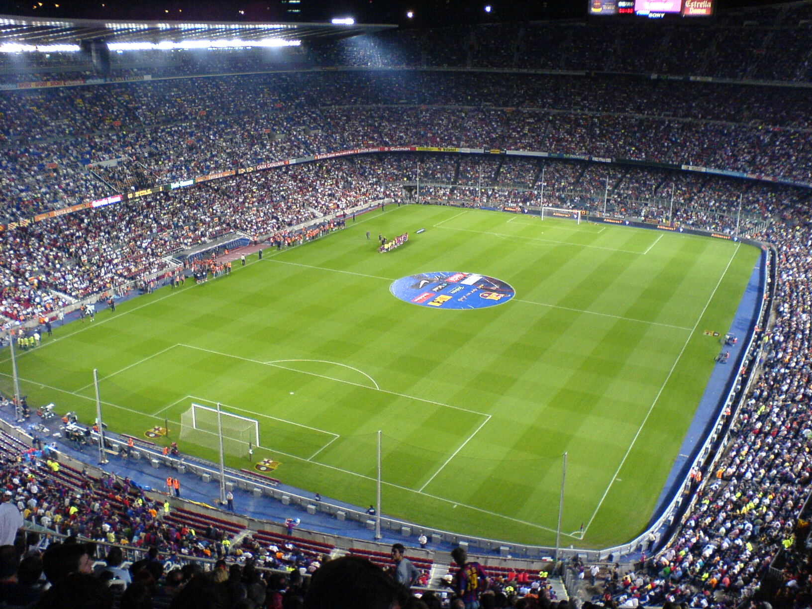 Camp nou, Sep. 2006, FC Barcelona vs. FC Valencia un très grand stade pour une très bonne ambiance